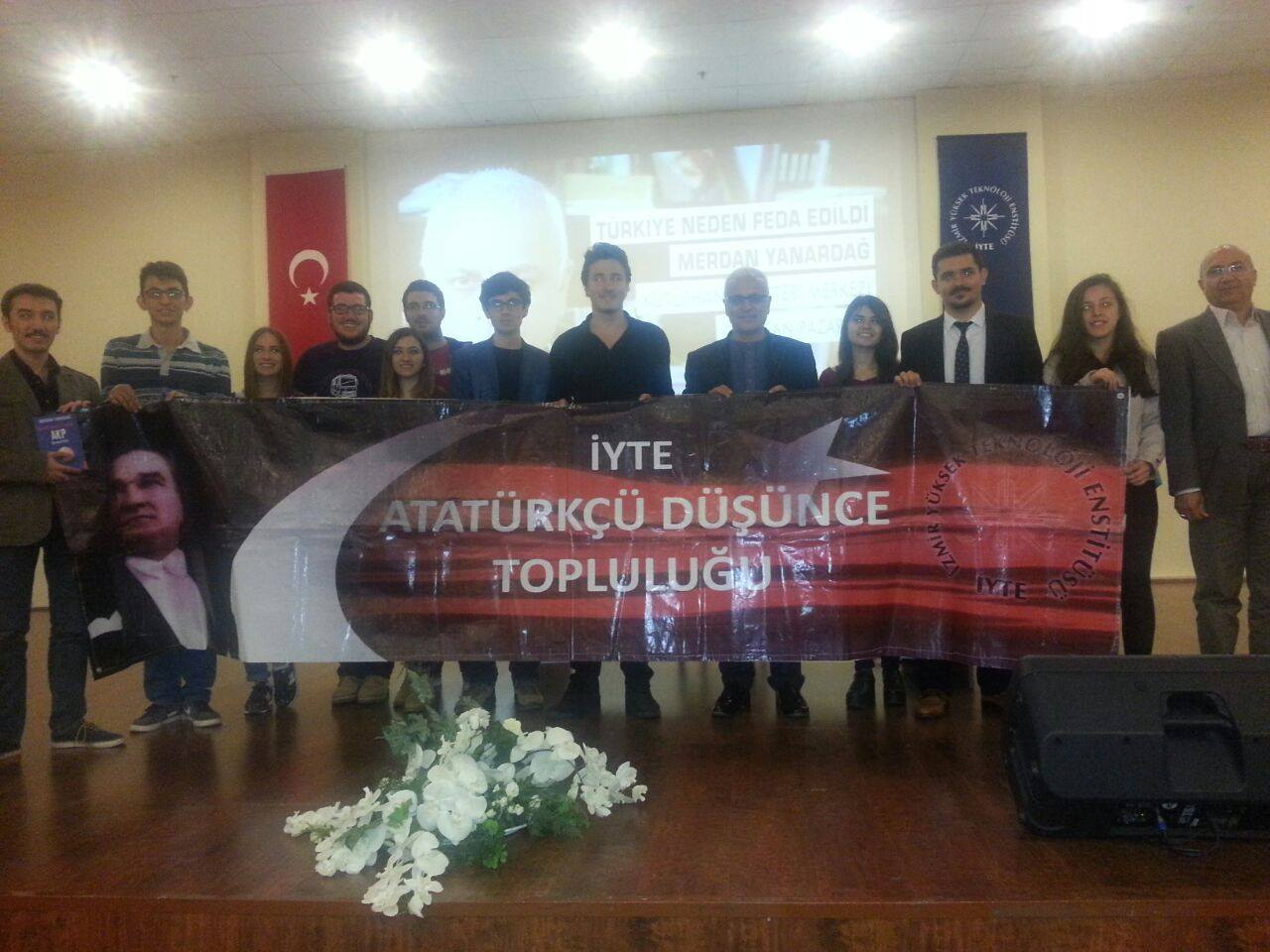 Merdan Yanardağ, İYTE Atatürkçü Düşünce Derneği'nin 20 Nisan 2015'te düzenlediği "Türkiye neden feda edildi?" konferansında